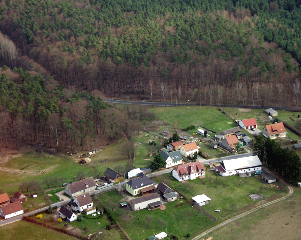 Zu sehen ist das Mecklenburgische Dorf Neu Canow.